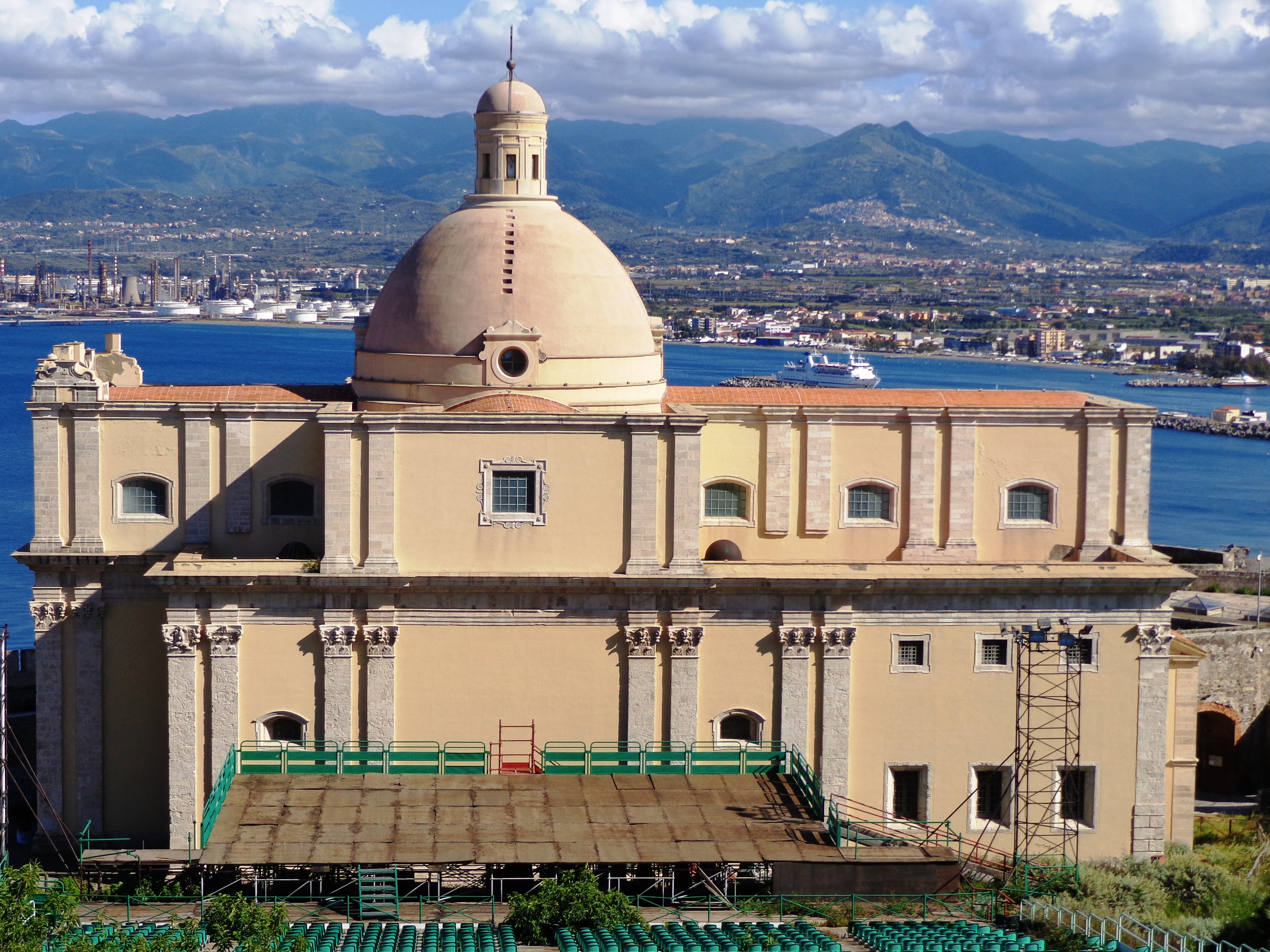 Duomo